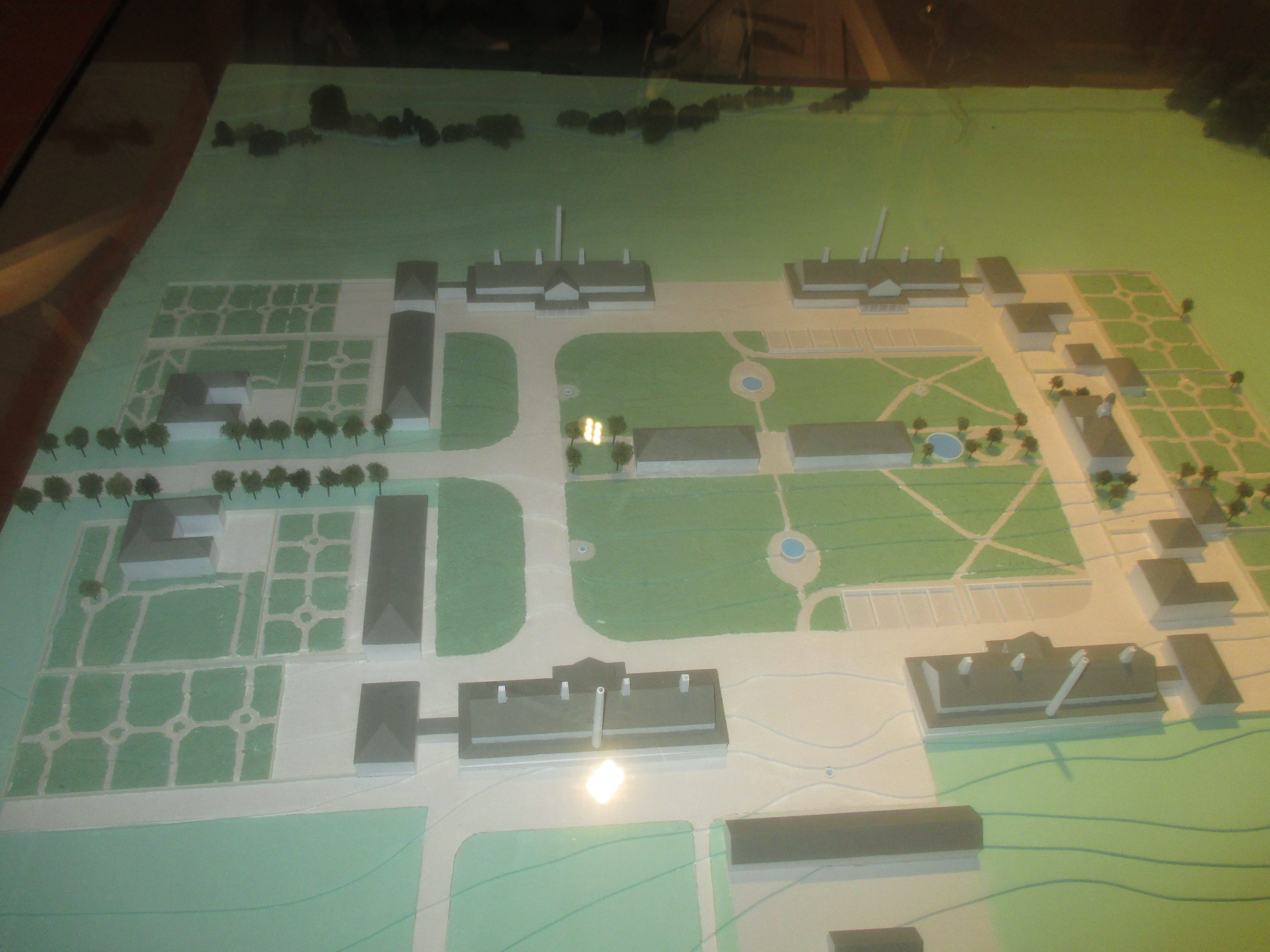 Saline Bad Rappenau Modell Anlage Neubau nach 1825 Forum Fränkischer Hof